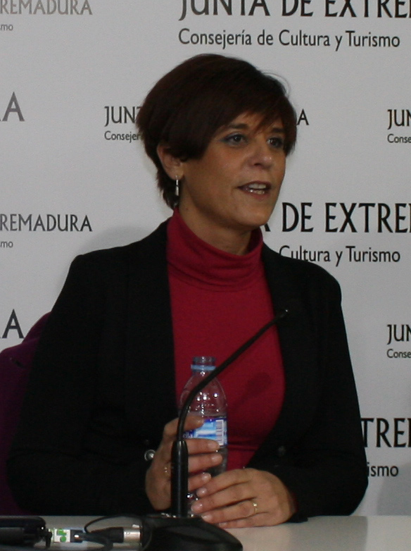 El presidente de la Junta de Extremadura y Secretario Regional del PSOE Guillermo Fernández Vara, ha destacado la importancia que tiene el sector turístico para la economía extremeña y ha expresado su confianza en la evolución futura del turismo regional, tras los datos positivos registrados en la Comunidad Autónoma, a pesar de la época de crisis actual